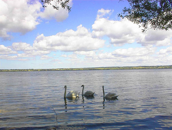 Виштынецкое озеро - Взгляд Русской стороны